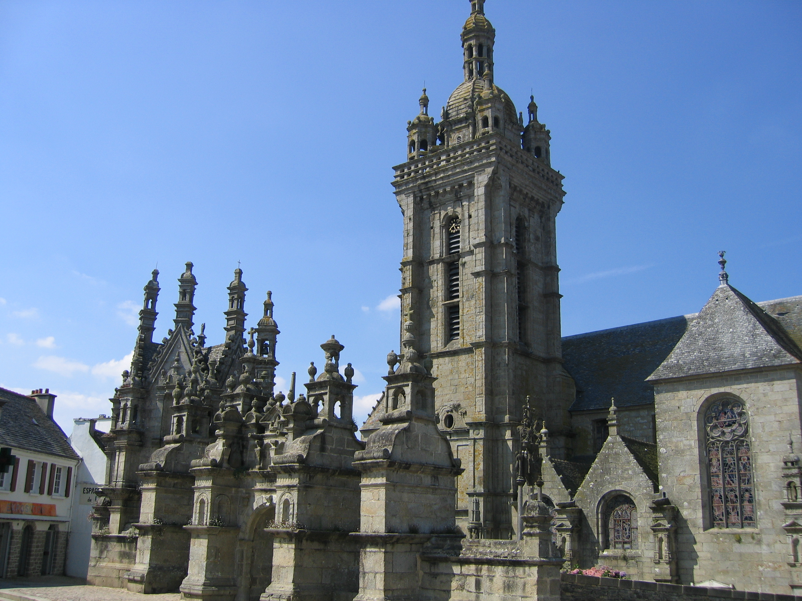 Enclos paroissial de Saint Thégonnec détail